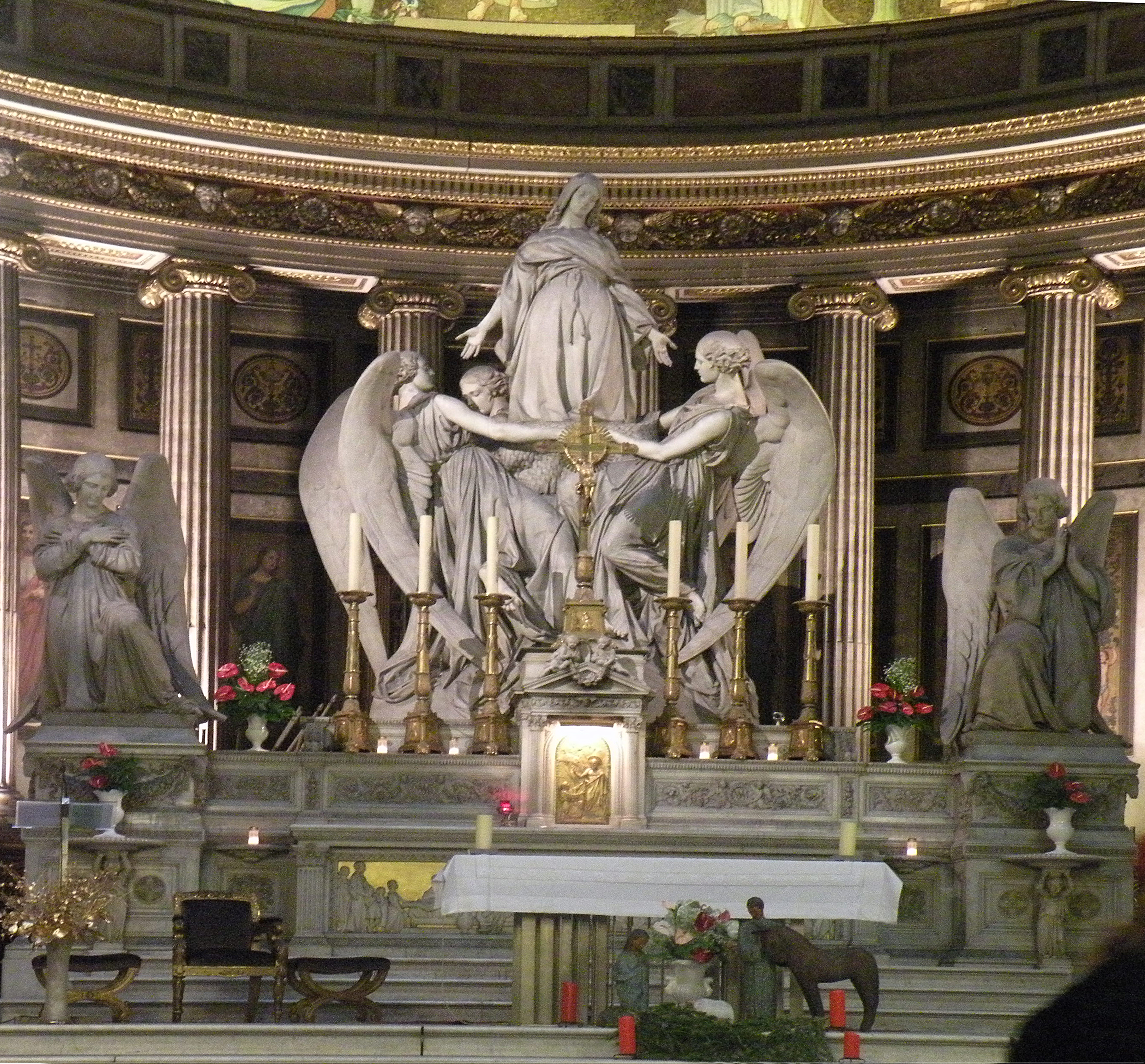 Алтарь_церкви_Мадлен.Париж